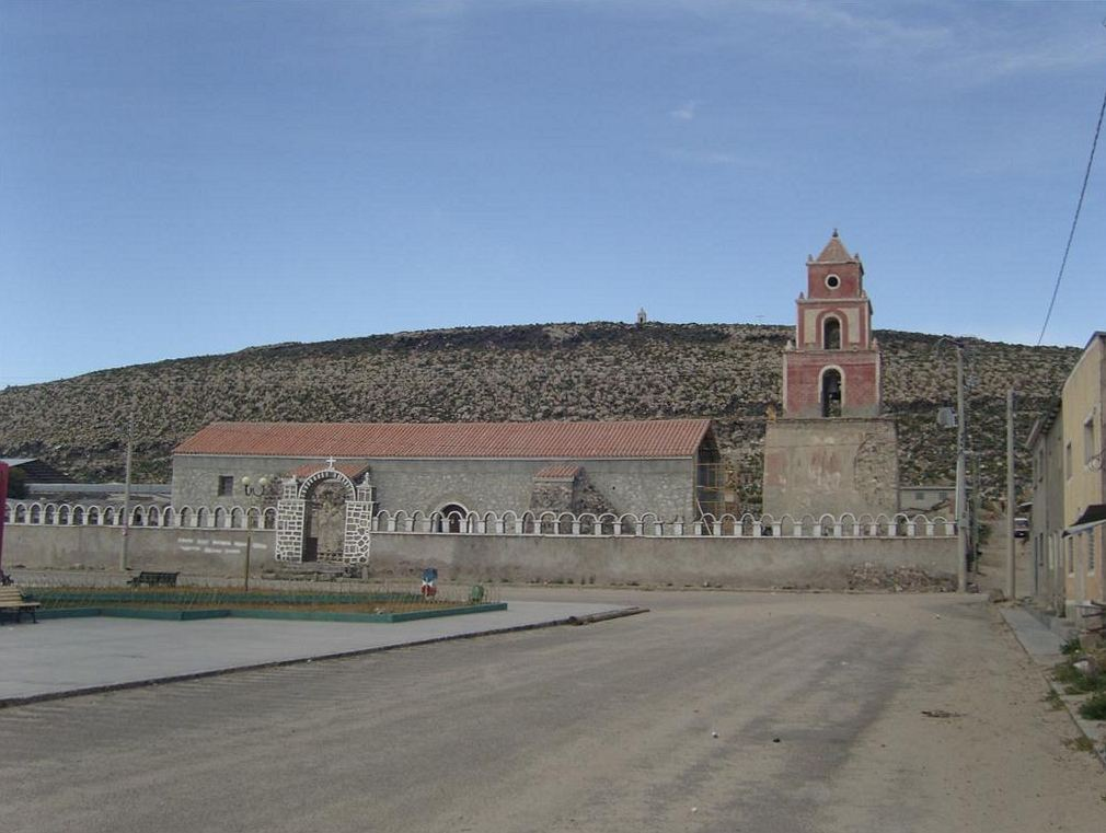 Iglesia de Pampa Aullagas, Oruro - Bolivia